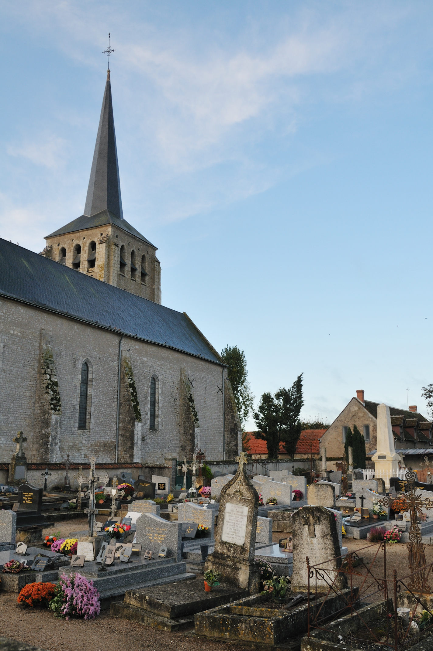 Église Saint-André et cimetière, Darvoy, Loiret, France